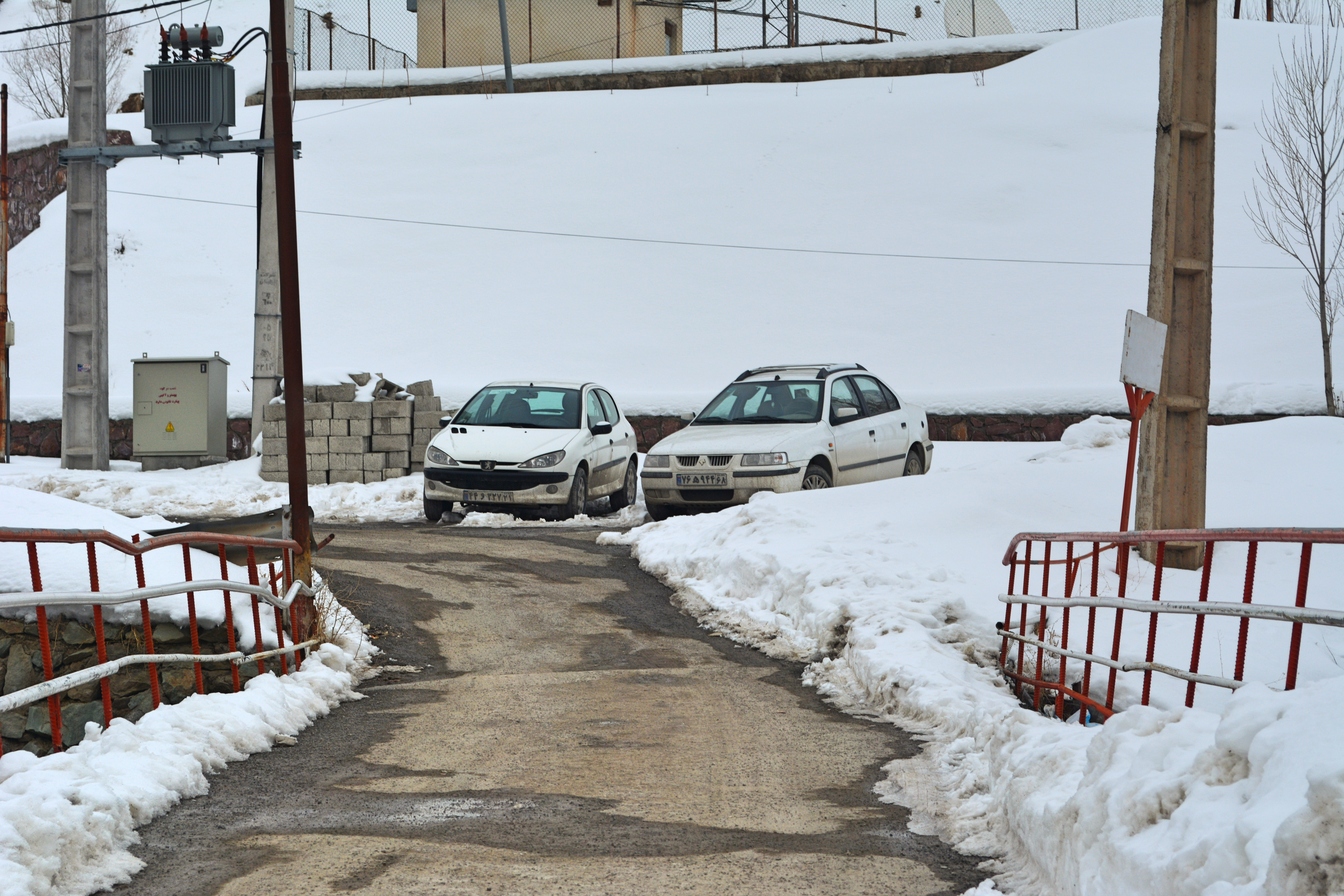 وروردی سرک